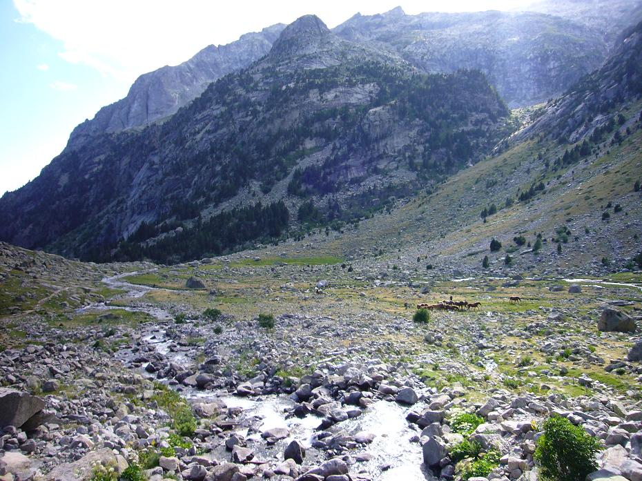 Pletiu de Riumalo, vist des del se extrem nord-oriental; la Vall de Boí, Alta Ribagorça, Catalonia